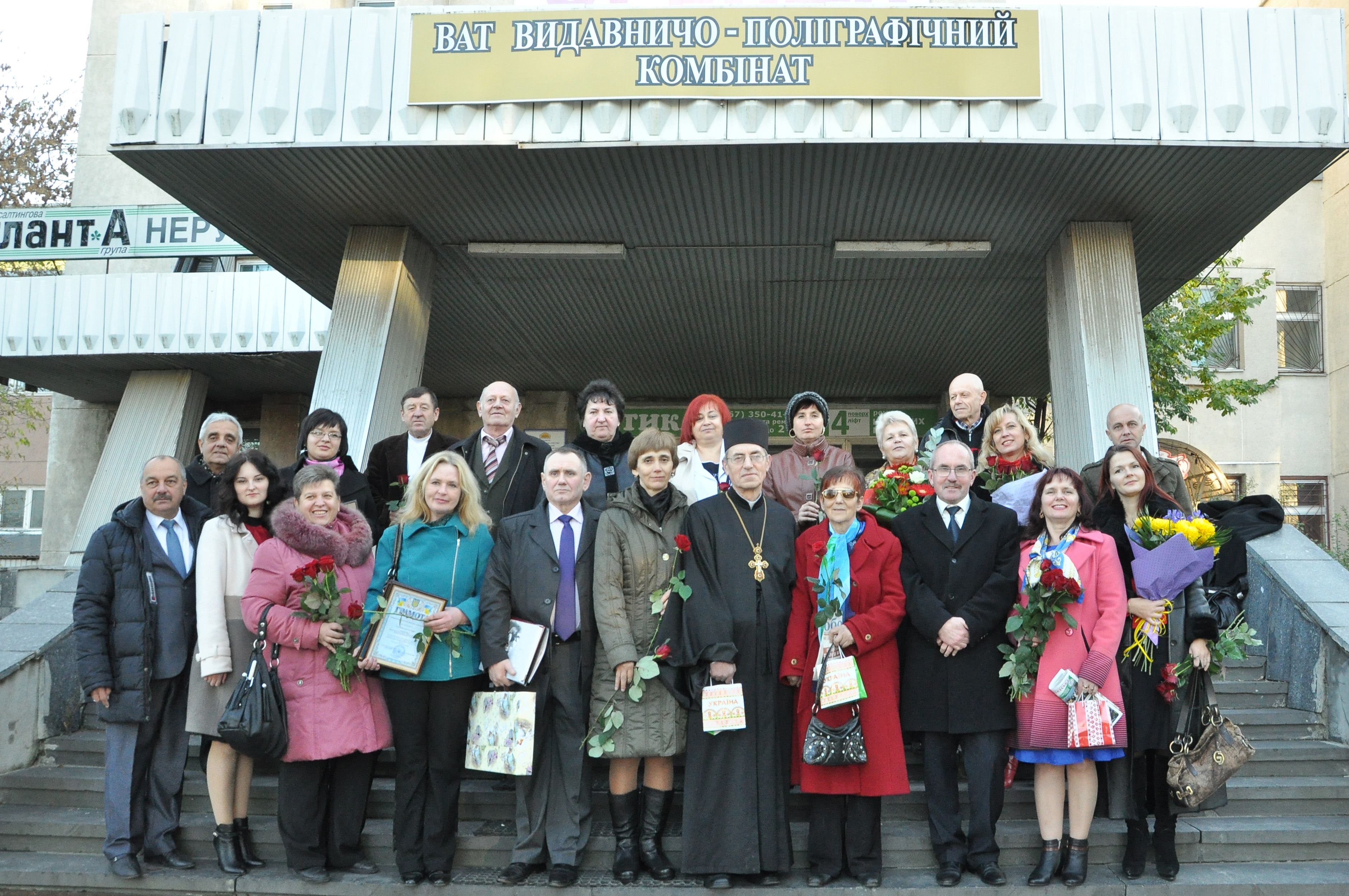 Колектив газети «Свобода» (м. Тернопіль) у день святкування 25-річчя при вході у колишнє видавництво «Збруч» на вул. Живова, 11 (28 жовтня 2015 року.) Верхній ряд: Богдан Приймак, Зоряна Деркач, Олександр Ліберний, Михайло Іващук, невідома, невідома, невідома, невідома, Володимир Хацаюк, Наталія Гавриш, Руслан Доротяк. Нижній ряд:Василь Томин, невідома, Галина Вандзеляк, Ольга Кушнерик, Богдан Новосядлий, Галина ???, о. Орест Глубіш, Ярослава Штокало-Пархомчук, Михайло Лисевич, Марія Баліцька, невідома.